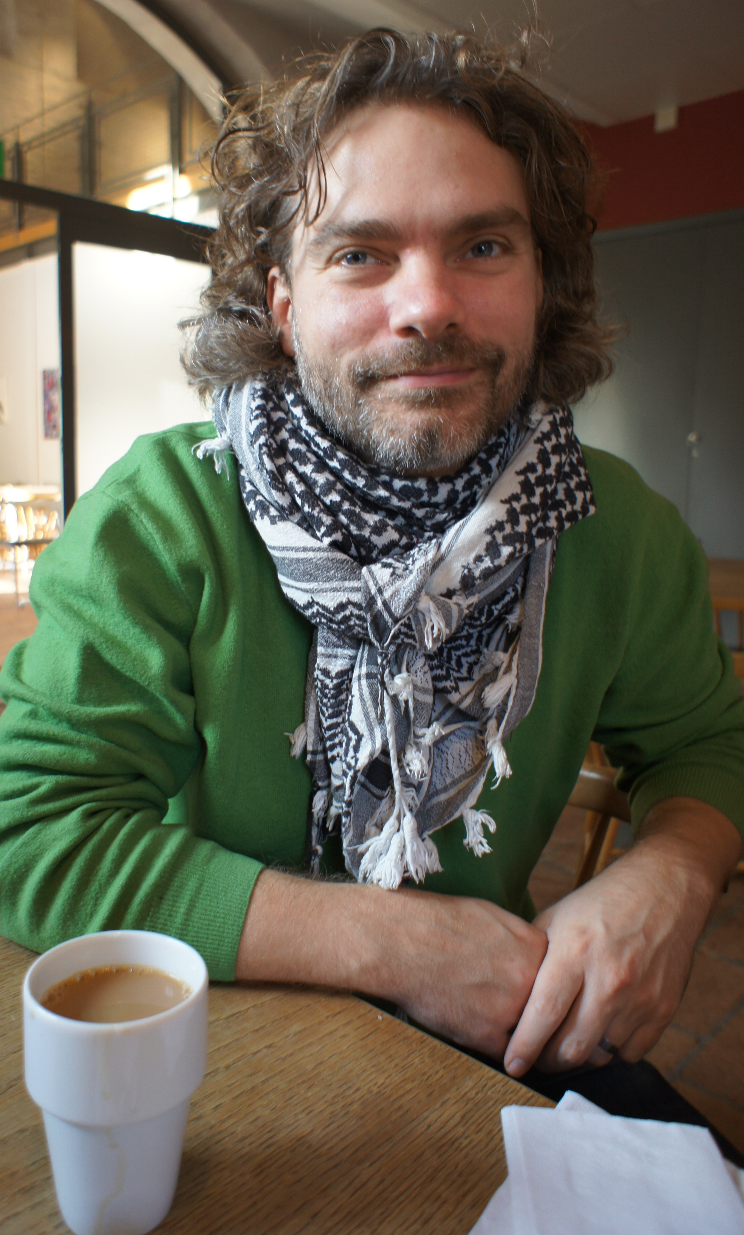 Christian Lundahl, 2010.